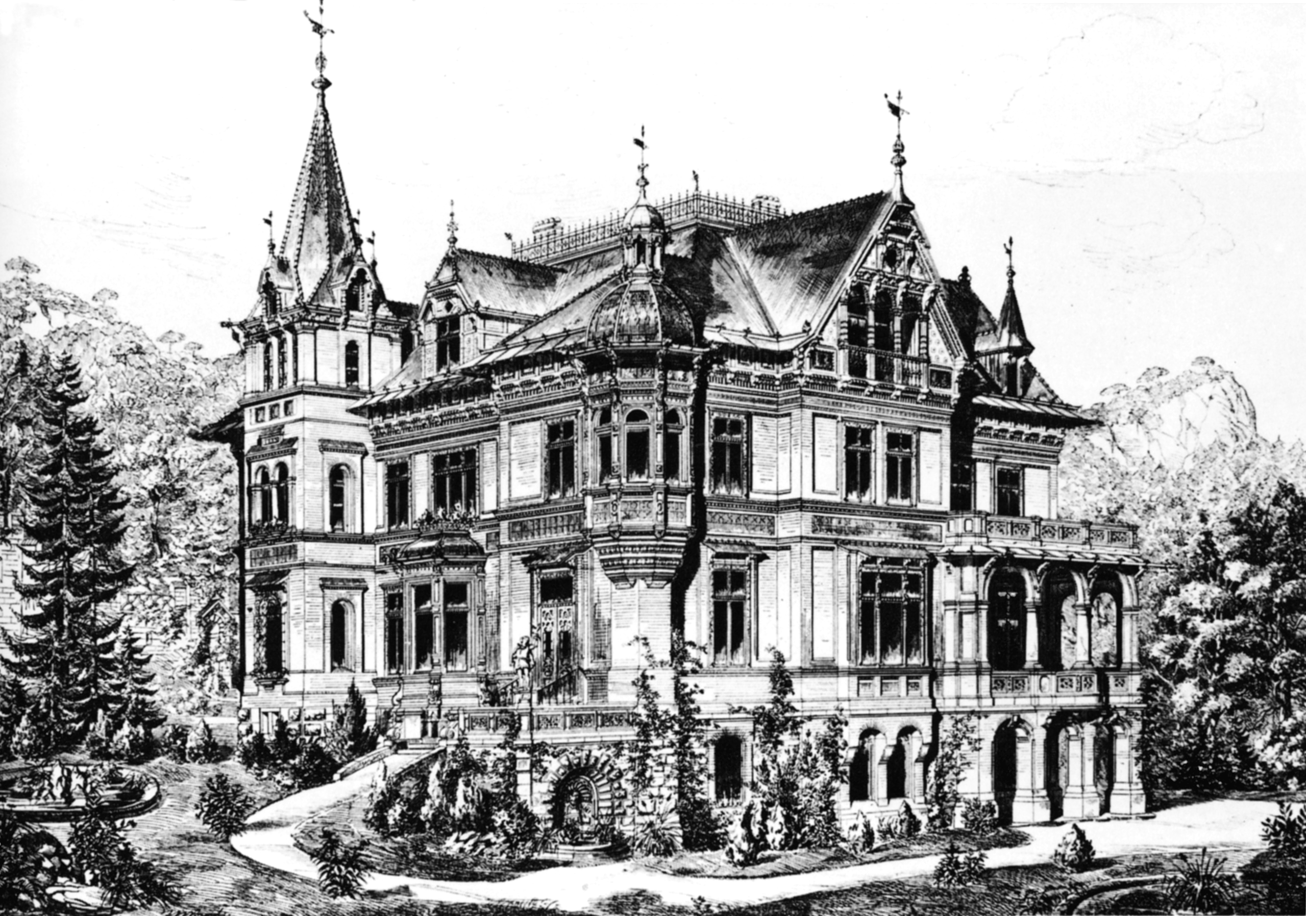 Baden bei Wien, Helenenstraße 72, Villa Gutmann.